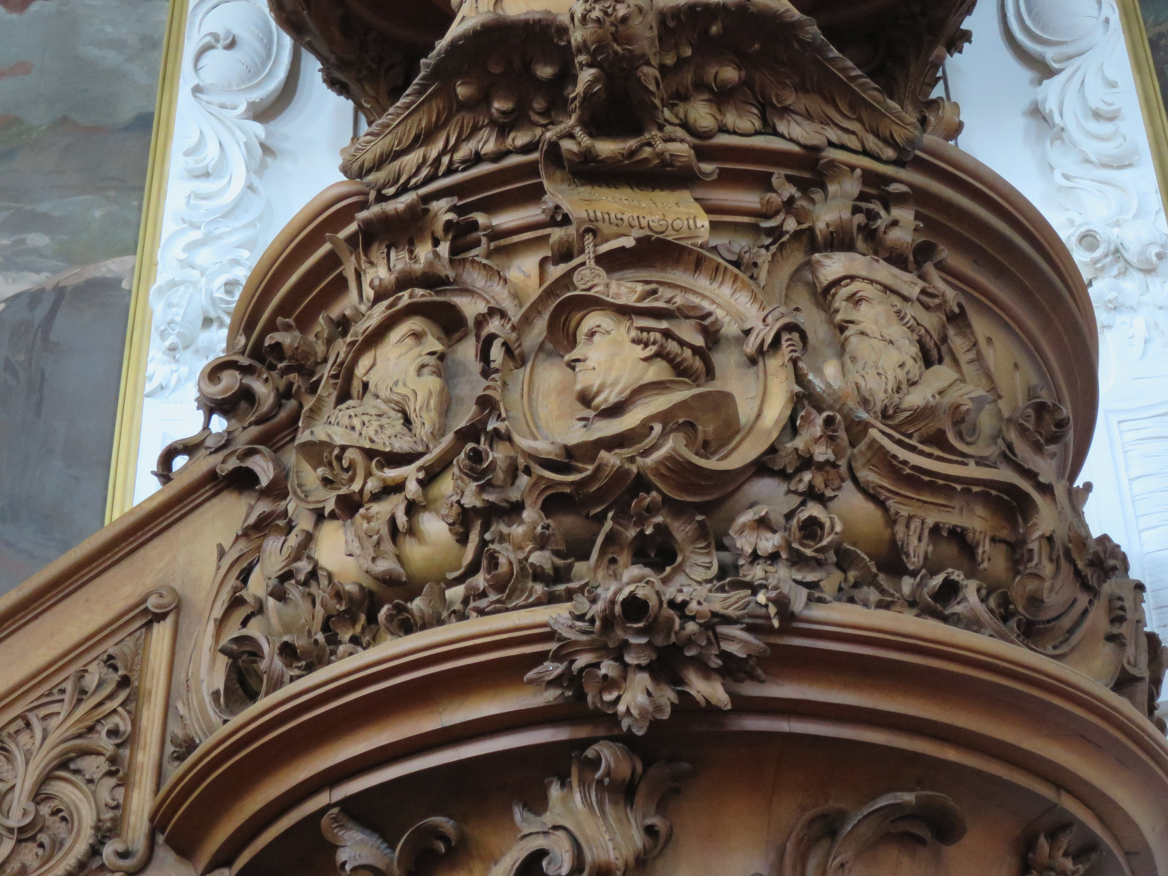 Der Korb der Neorokoko-Kanzel in der reformierten Kirche Horgen von 1890 mit den Bildnissen der Reformatoren Huldrych Zwingli (mitte), Jean Calvin (links) und Johannes Oekolampad (rechts); darüber die Inschrift "Ein feste Burg ist unser Gott", die durch Martin Luthers Choral zur Losung der Reformation geworden war.